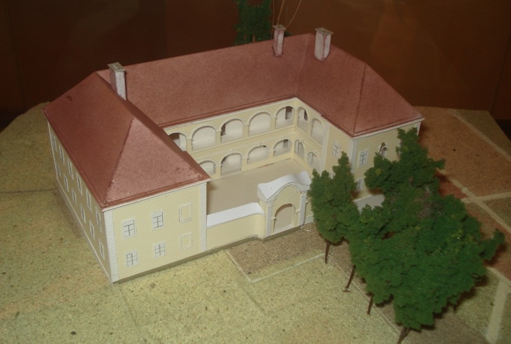 Maketa dvorca Zajezda